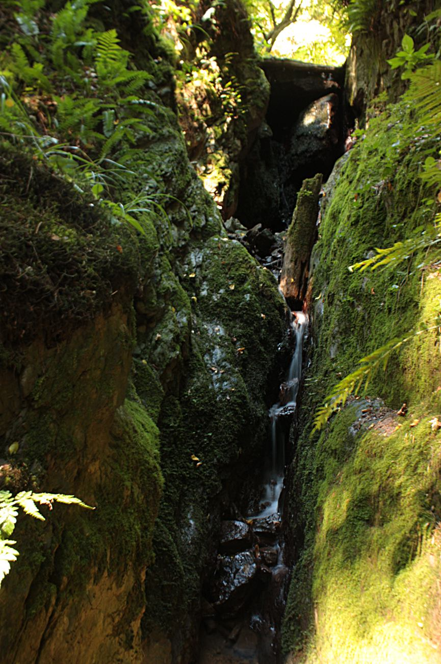 Trenckova rokle je přírodní památka ev. č. 5725 poblíž obce Drahonín v okrese Brno-venkov.